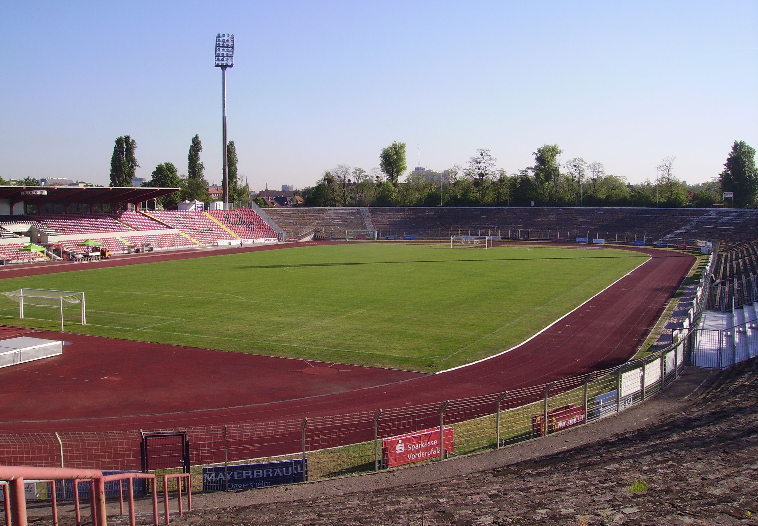 stadium in Ludwigshafen in Rhineland-Palatinate, Germany